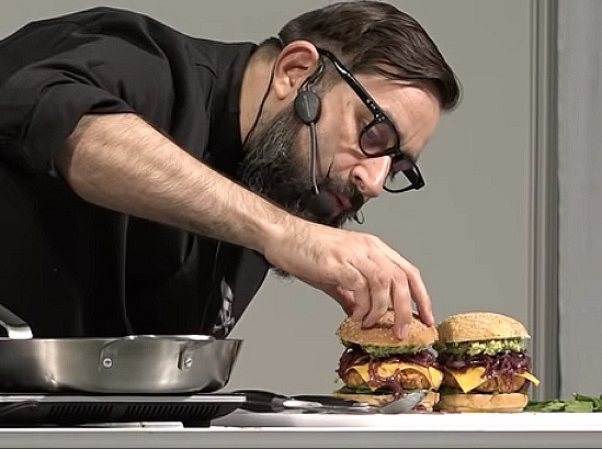 Burgers "décadents" réalisés par Sébastien Kardinal, en octobre 2018 lors d'une démonstration culinaire au Festival végane de Montréal.